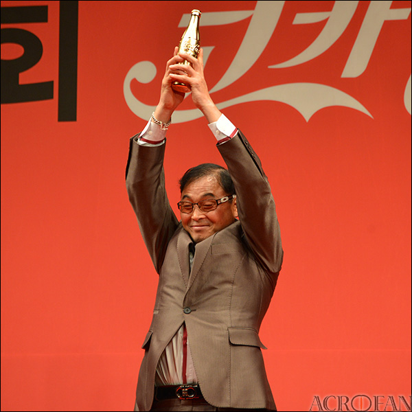 제3회 및 제8회 코카-콜라 체육대상 최우수선수상 수상자 이봉주